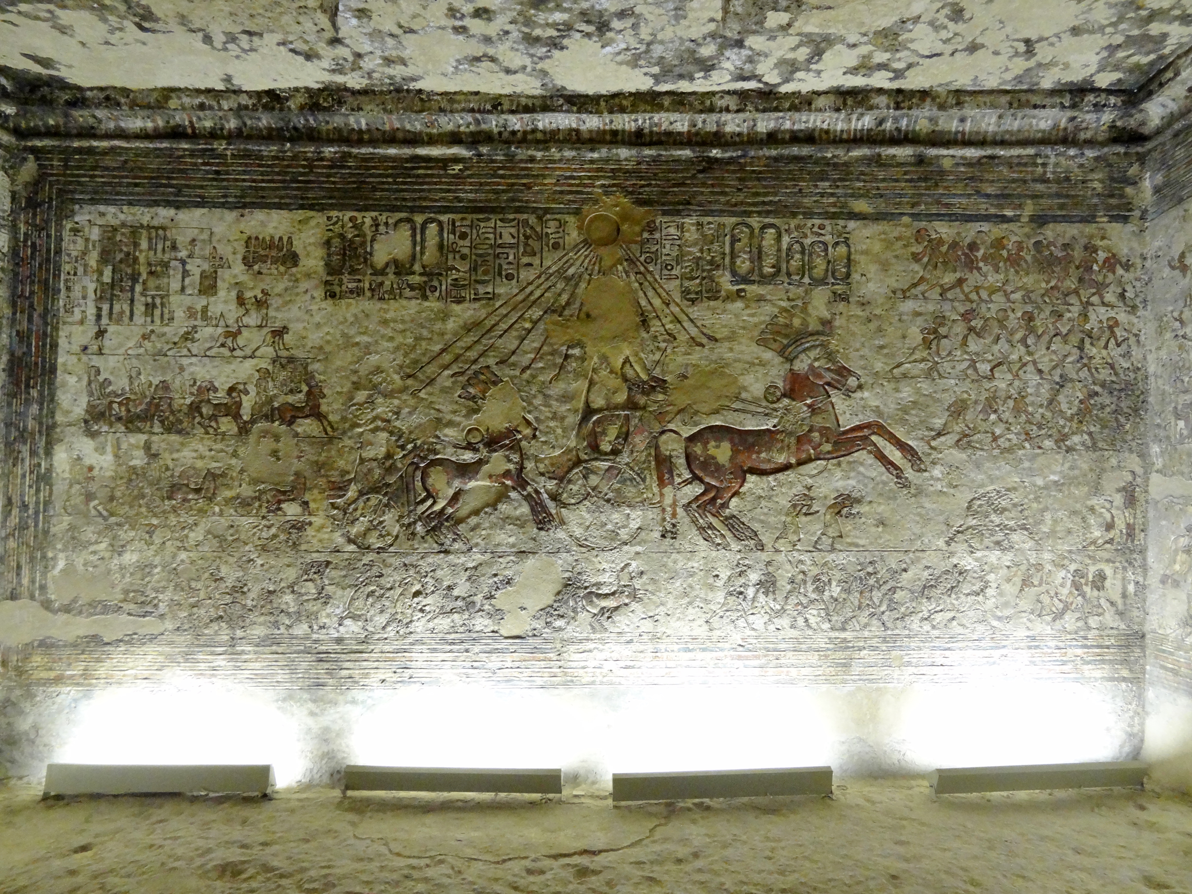 Grab des Merire I. (TA 4) in Tell el-Amarna, Ägypten